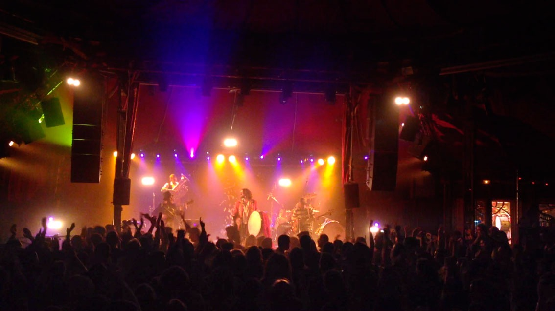 Une grande soirée avec standing ovation pour Luca Bassanese